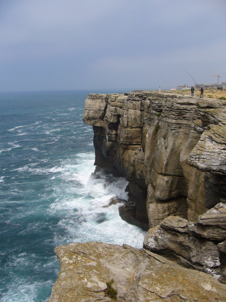 Steilküste bei der portugisischen Hafenstadt Peniche, Blick nach Osten